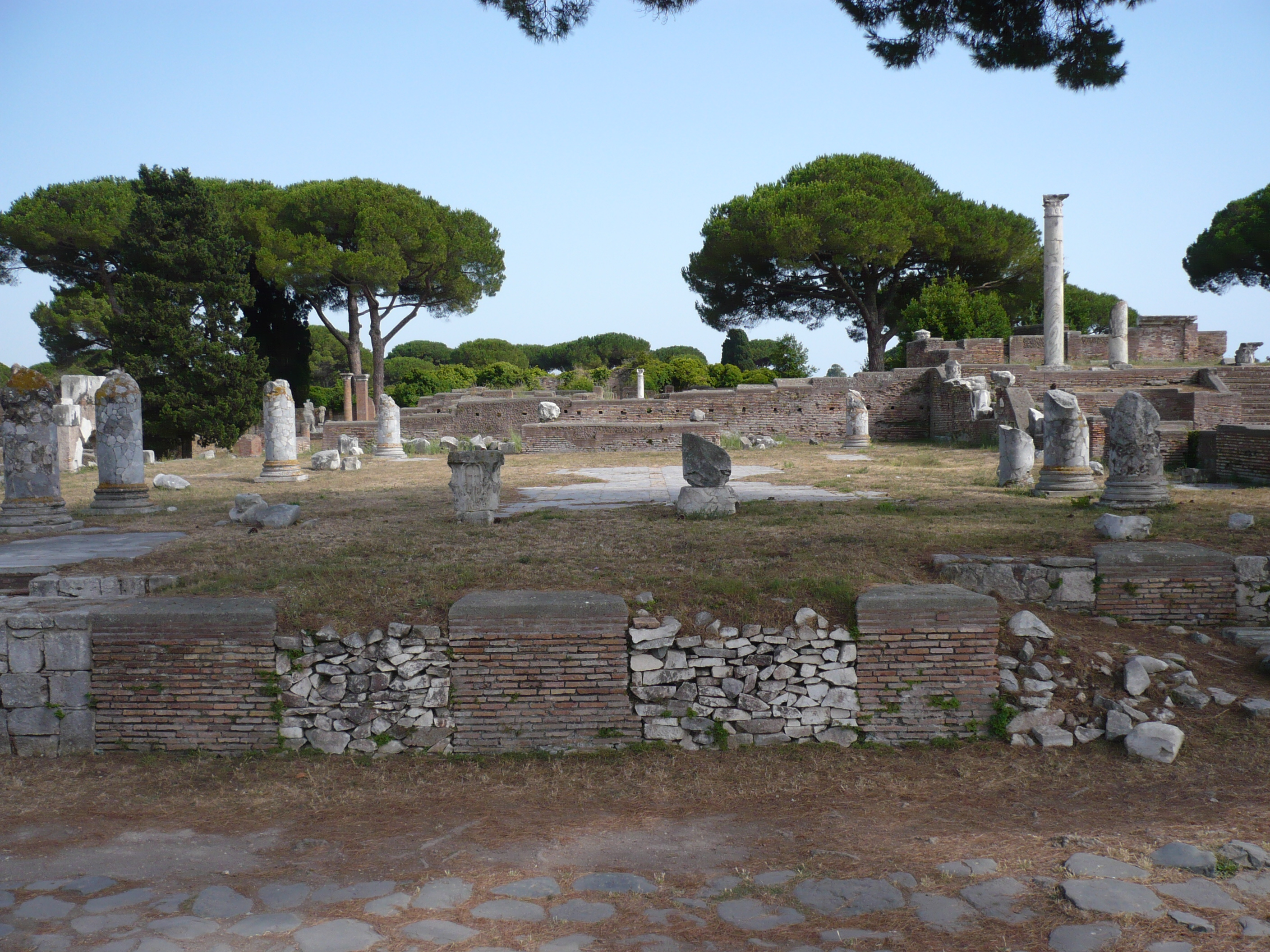 Basilica civile of Ostia Antica.